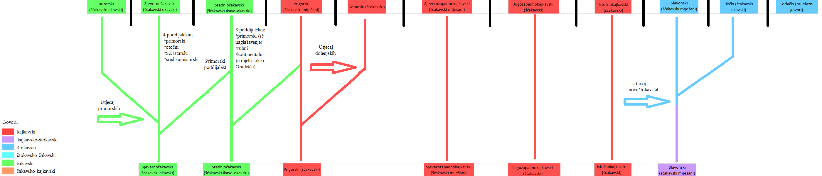 Struktura i razvoj ekavskih govora/dijalekata u Hrvata